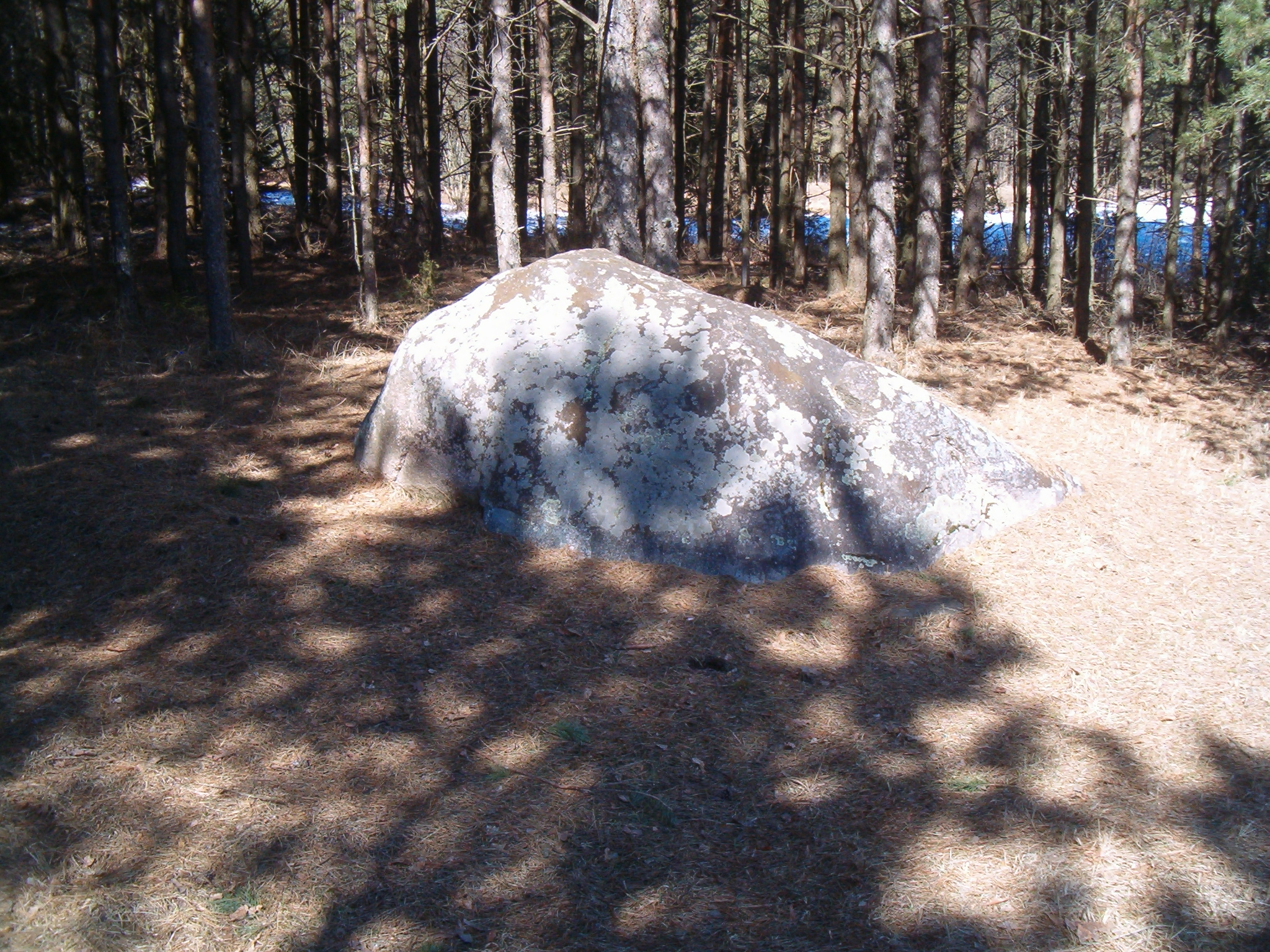 Mindūnų sen., Lithuania